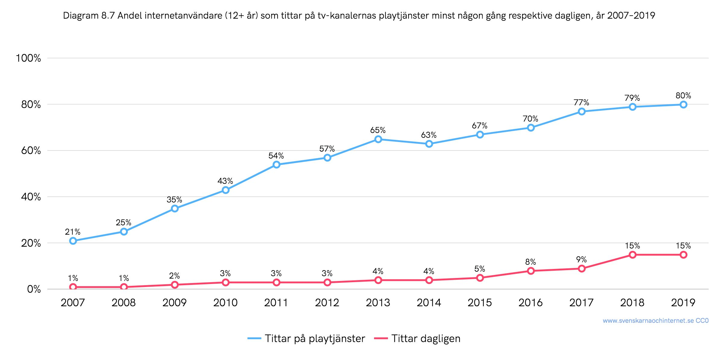 Andel av de svenska internetanvändarna (12+ år) som tittar på TV-kanlernas playtjänster minst någon gång respektive dagligen, år 2007–2019. Siffror från undersökningen "Svenskarna och internet".